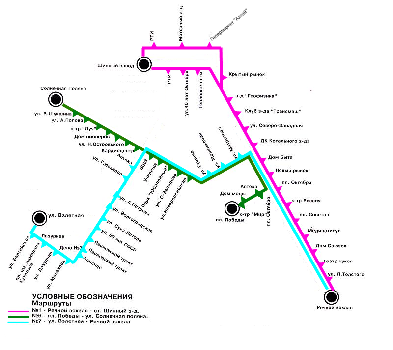 схема